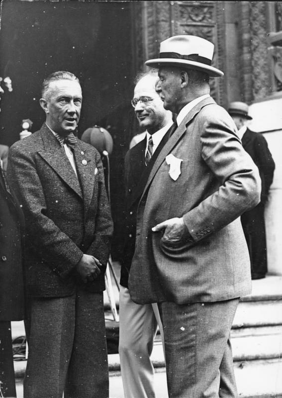 Berlin, Olympia-Vorbereitung Scherl Die amerikanischen Olympiakämpfer in Berlin eingetroffen Staatskommissar Dr. Lippert, Dr. Lewald und mitte der Leiter der Amerikaner, Brundage. (Photo Hoffmann) 24.Juli 1936 [Vor dem Roten Rathaus in Berlin] Abgebildete Personen:vlnr Lippert, Julius Dr.: Staatskommissar und Oberbürgermeister von Berlin, NSDAP, Journalist, Deutschland Brundage, Avery: Präsident des Internationalen Olympischen Komitees (IOC), USA (GND 118516078) Lewald, Theodor Dr.: Organisationskomitee der Olympischen Spiele, IOC, Staatssekretär, Deutschland